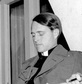 Kyrkoadjunkt Anders Frostenson